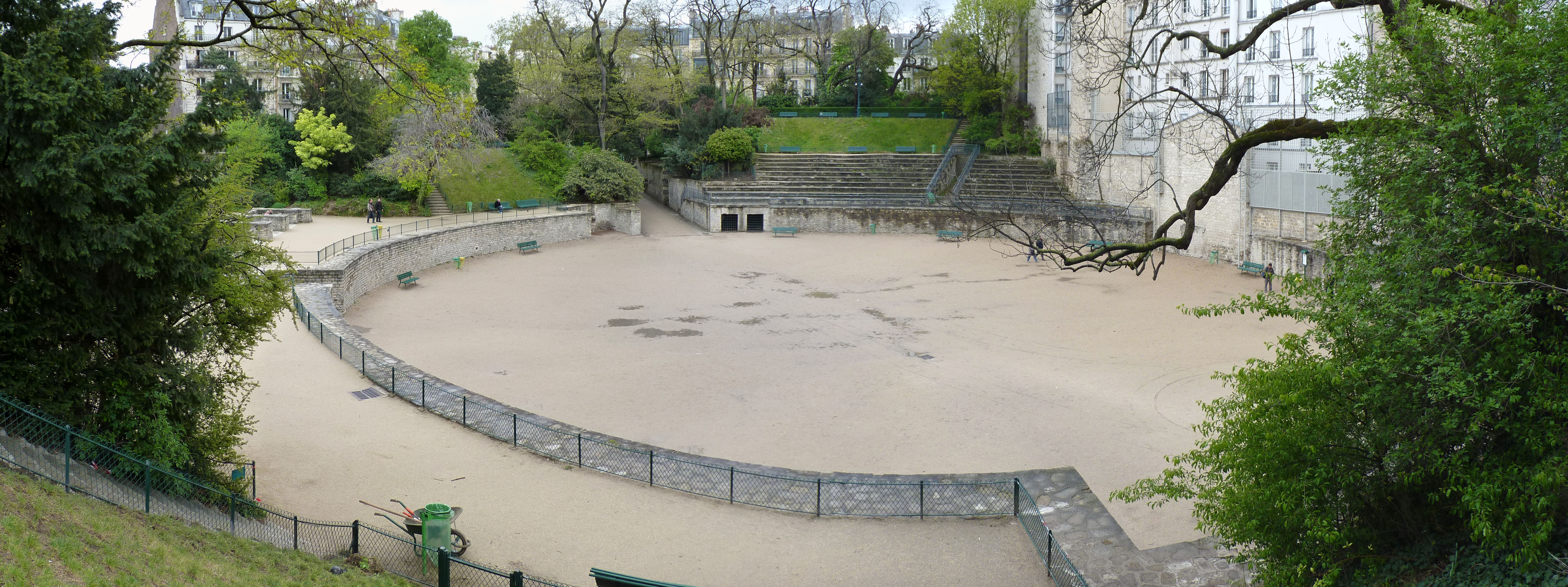 The Roman-Gallon ruins Arènes de Lutèce, Paris, France.